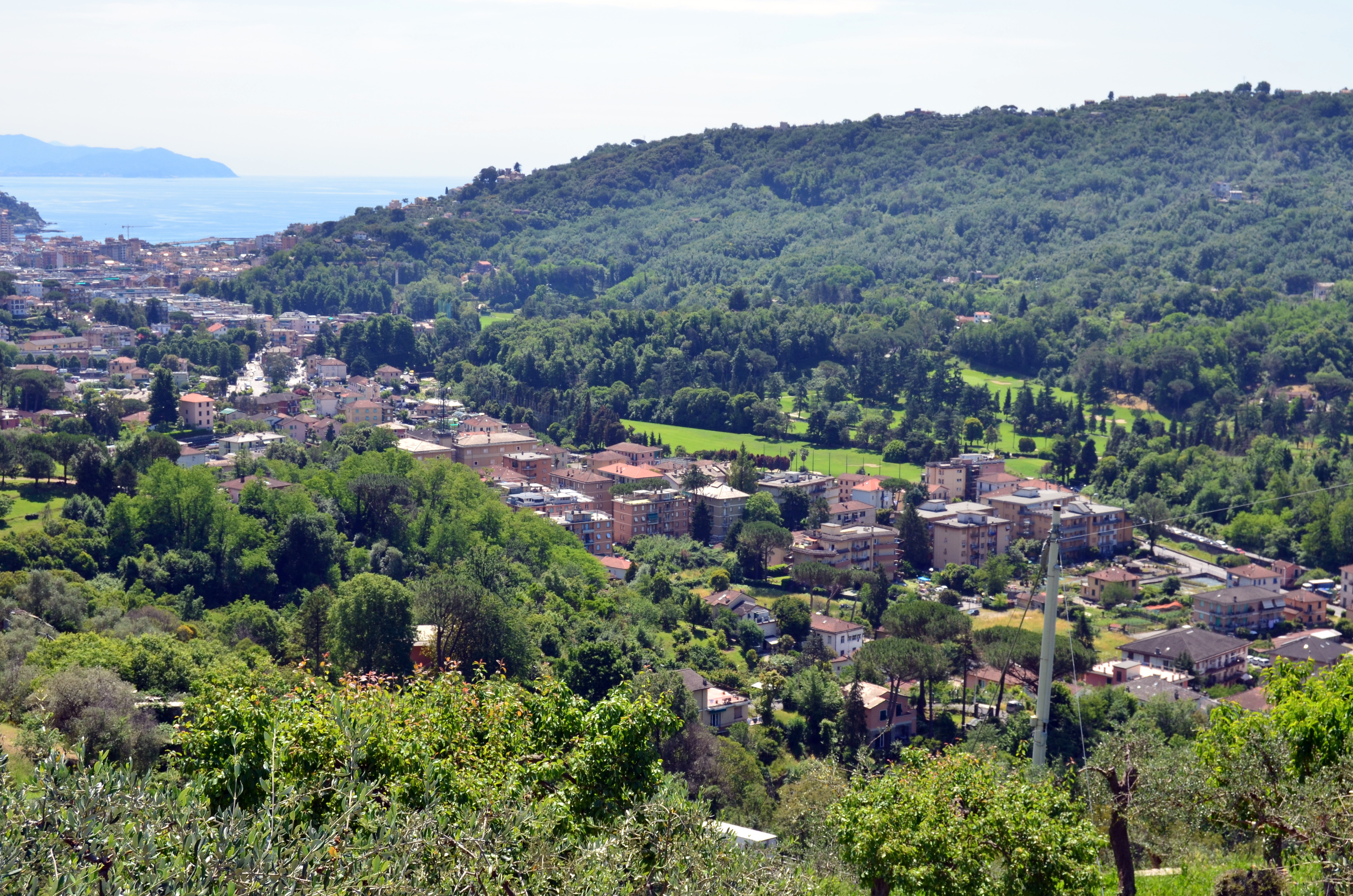 Panorama di Santa Maria del Campo di Rapallo, Liguria, Italia